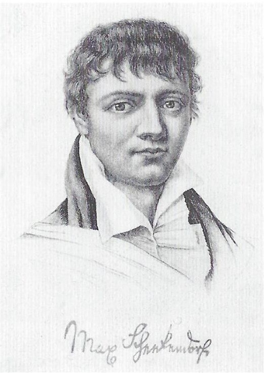 Max von Schenkendorf (1783–1817)